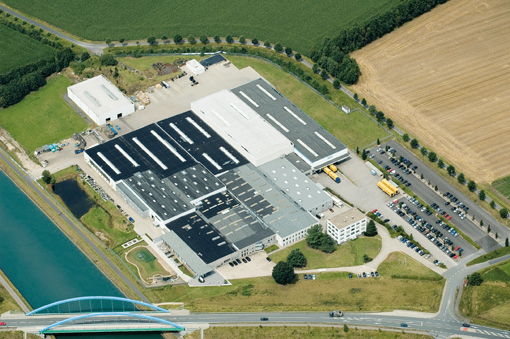 Standort Hörstel